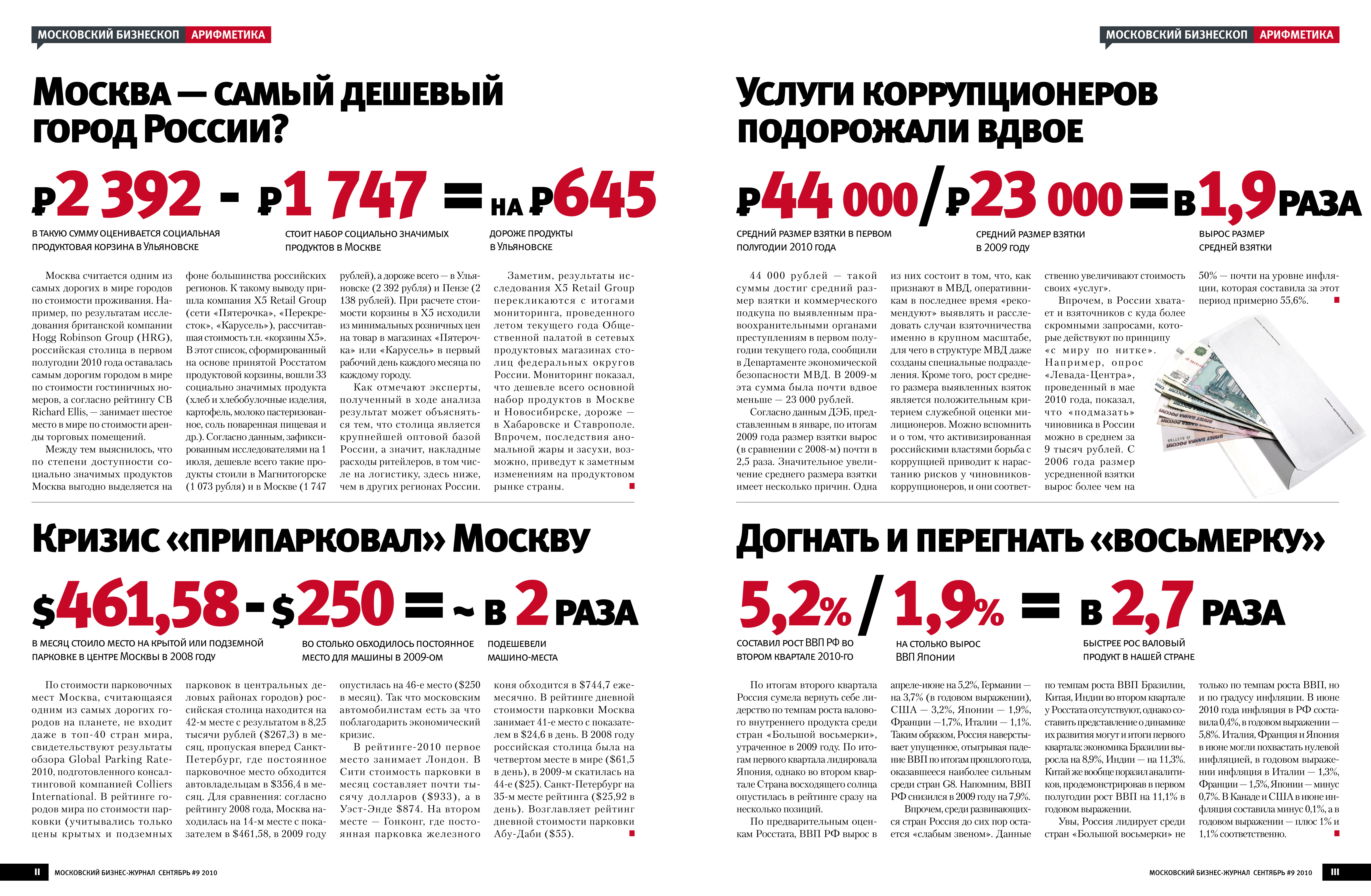 Московский бизнес-журнал, № 9 (сентябрь) за 2010 год, страницы II—III